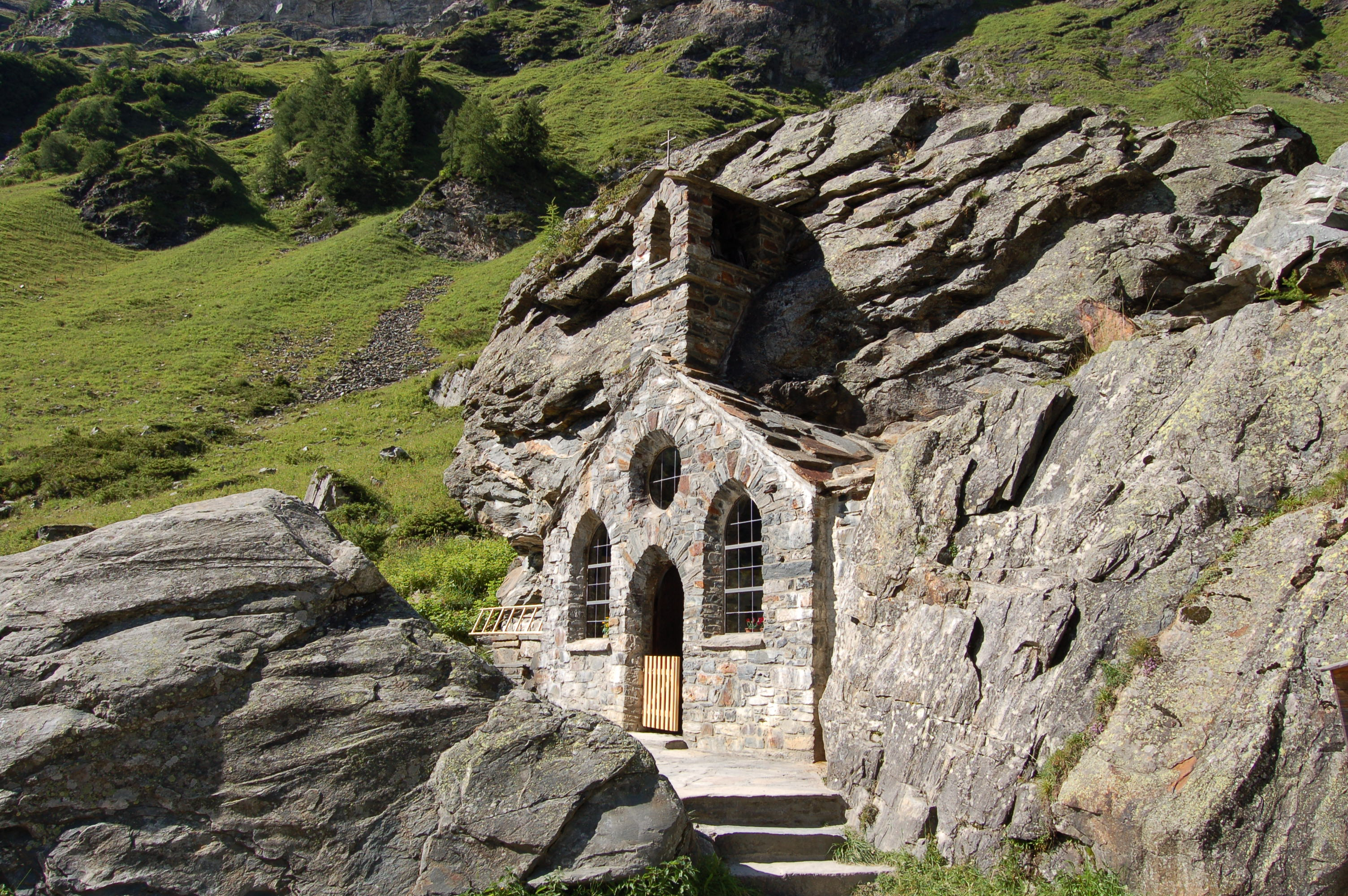 Die denkmalgeschützte Felsenkapelle im Gschlößtal (Gemeinde Matrei in Osttirol)